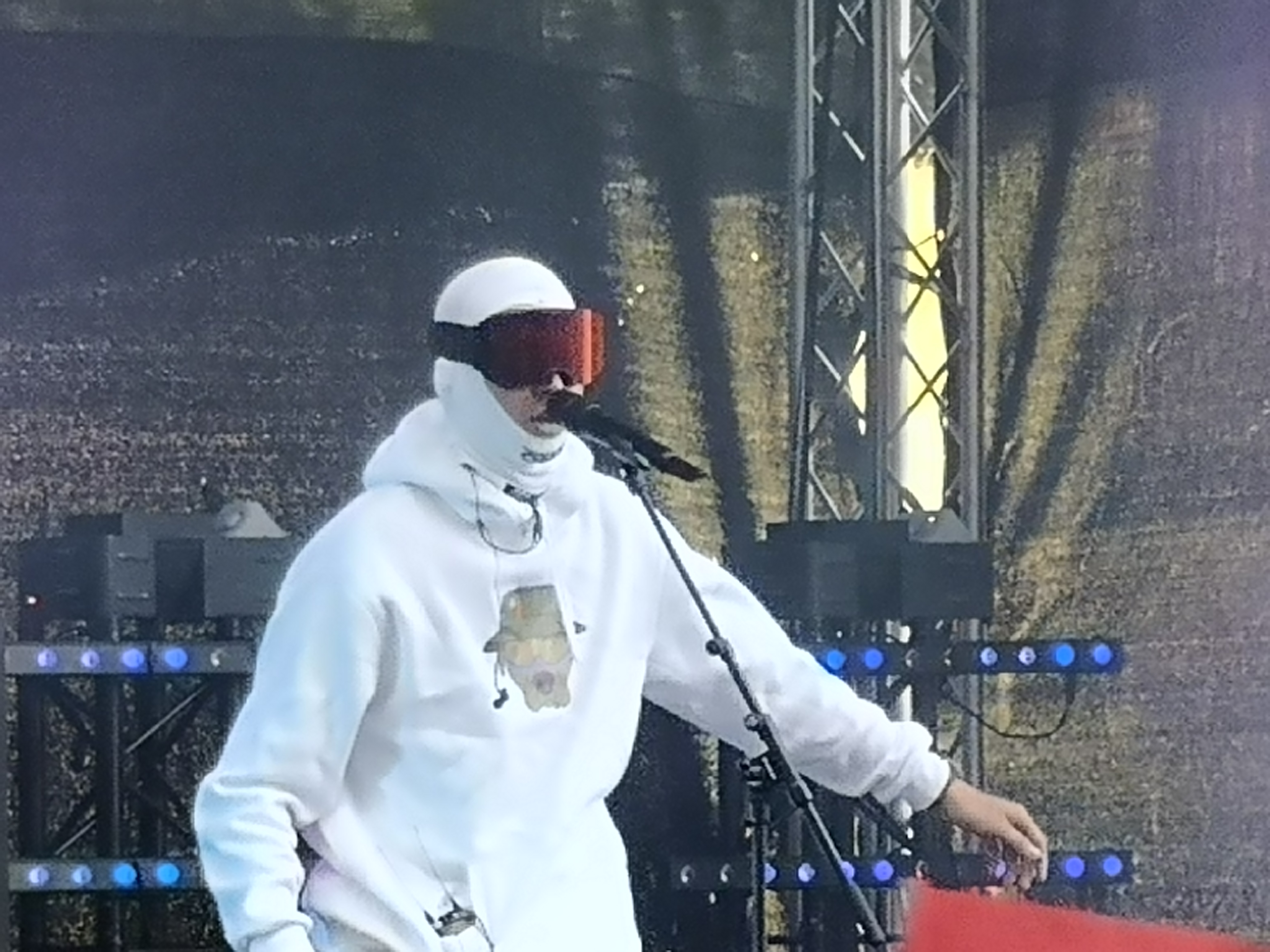 Eesti räppar Nublu esinemas Delfi teisel rallipäeval Lauluväljakul